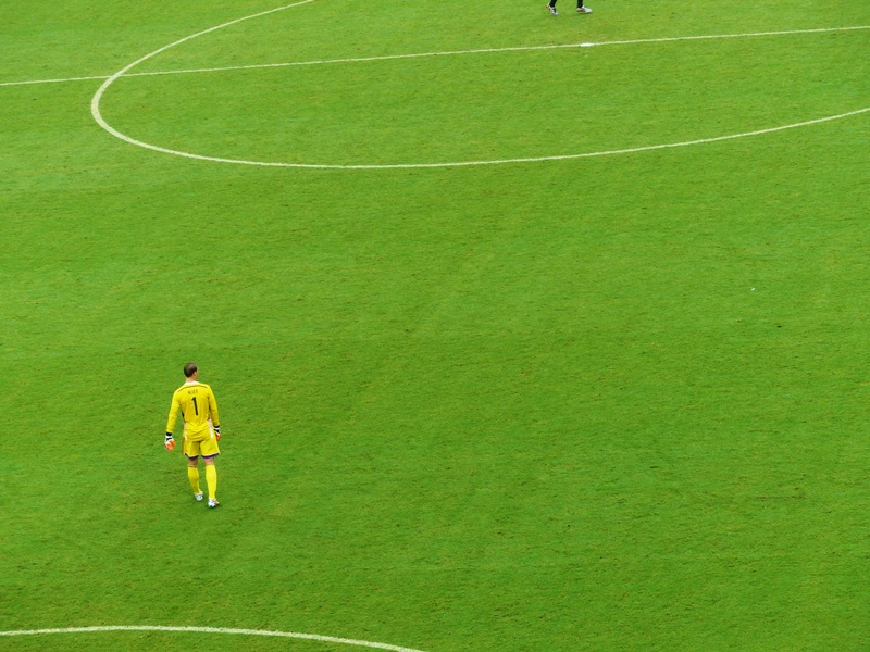 Copa do Mundo de Futebol 2014, Recife Brasil